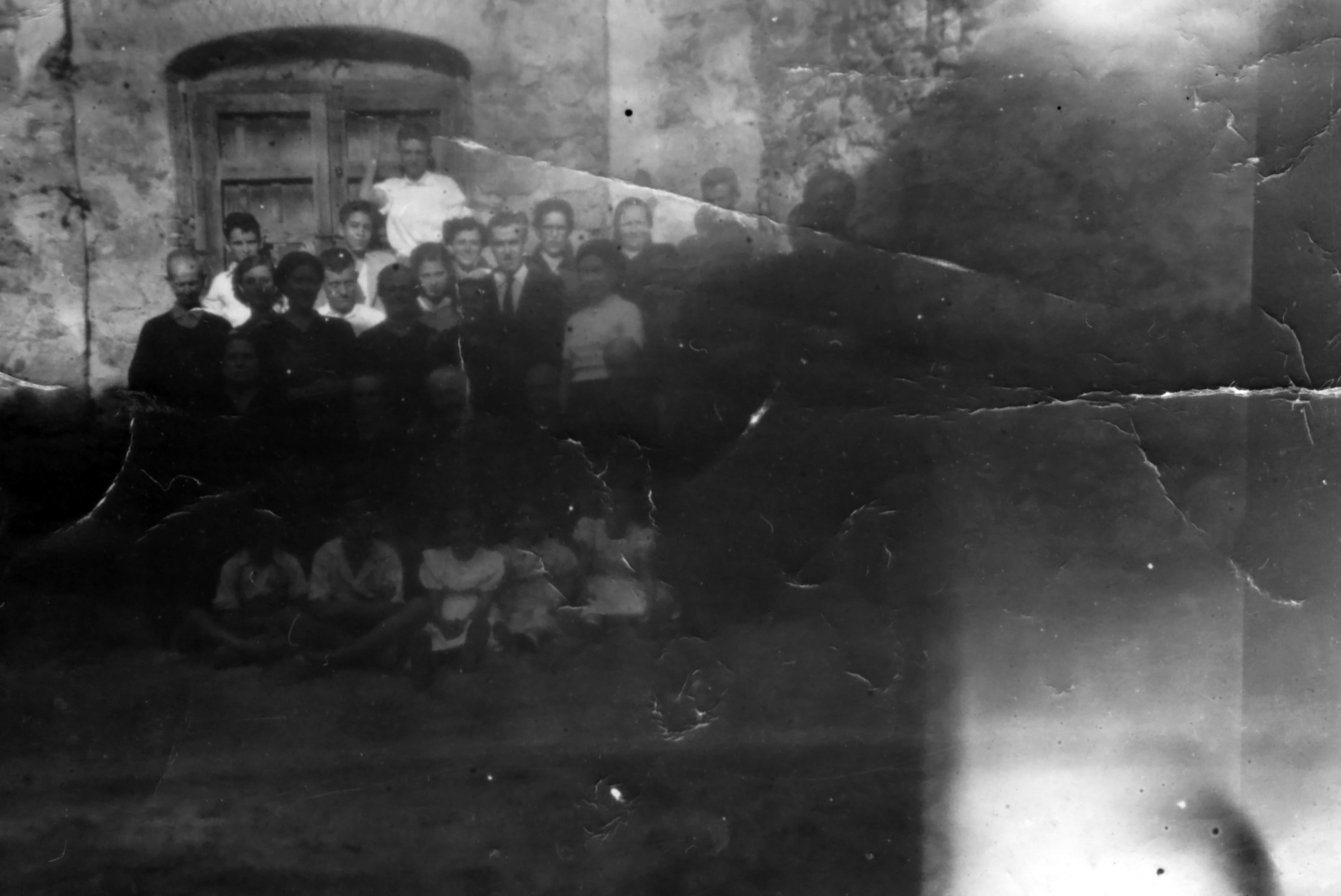 La congregación evangélica de Ibahernando (Cáceres) a mediados de los años 60.